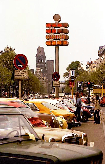 Berlin-Uhr am früheren Standort an der Kreuzung Kurfürstendamm / Uhlandstraße in Berlin-Charlottenburg.